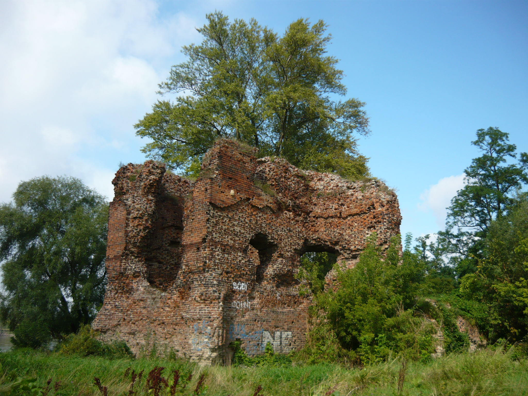 Ruiny zamku Kazimierza Wielkiego we wsi Złotoria, woj. kujawsko-pomorskie.